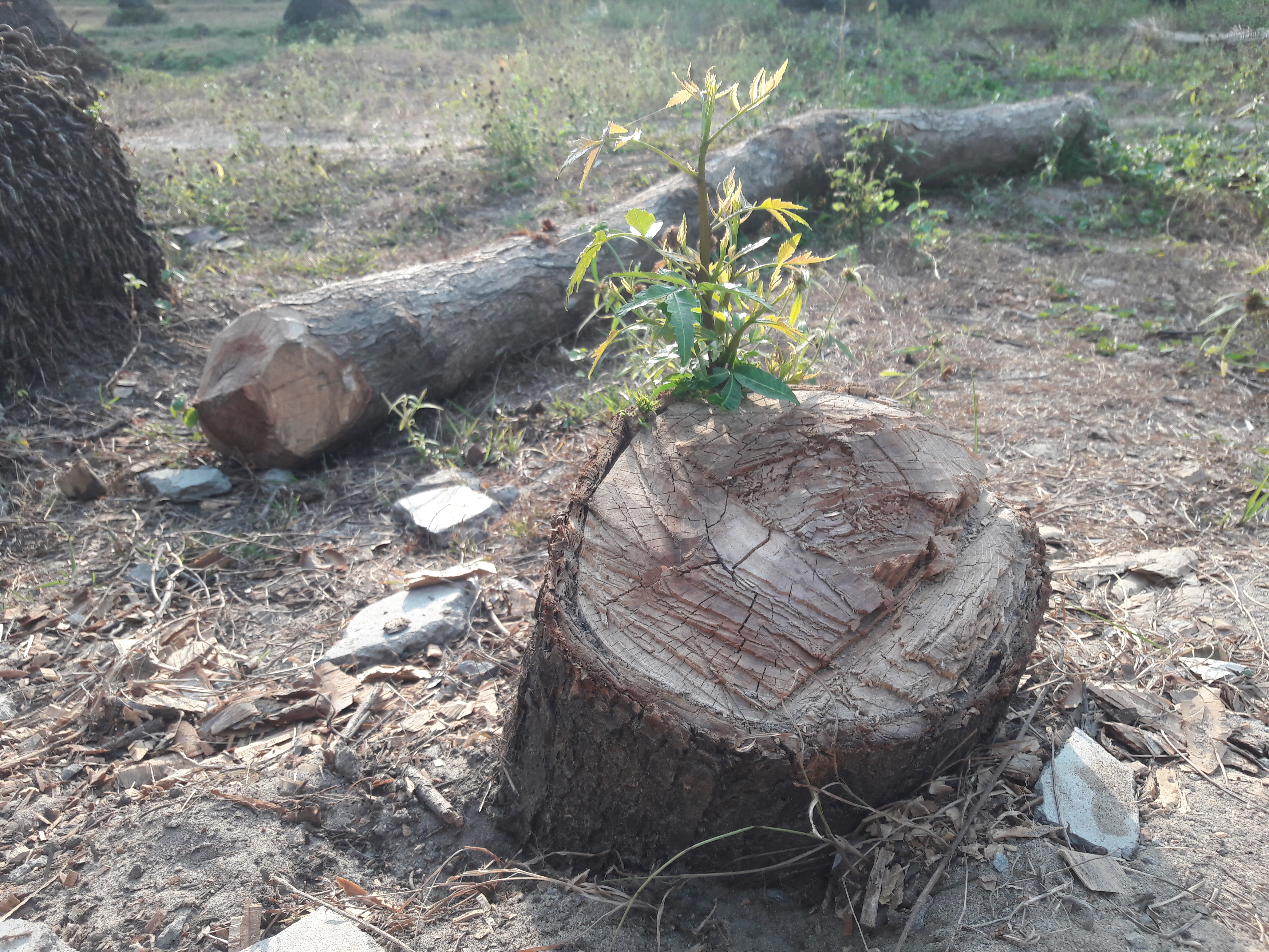 മുറിച്ചിട്ട ആര്യവേപ്പ് മരത്തിന്‍റെ കുറ്റിയില്‍ നിന്ന് പുതു നാമ്പ് കിളിര്‍ത്ത് വരുന്നു. Neem tree ശാസ്ത്രീയ നാമം Azadirachta indica കുടുംബം Meliaceae.